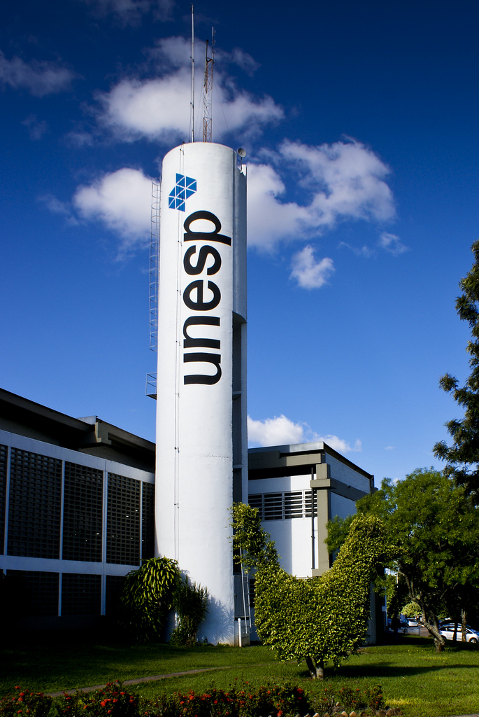 Torre do campus da Unesp de Marília, São Paulo, Brasil.